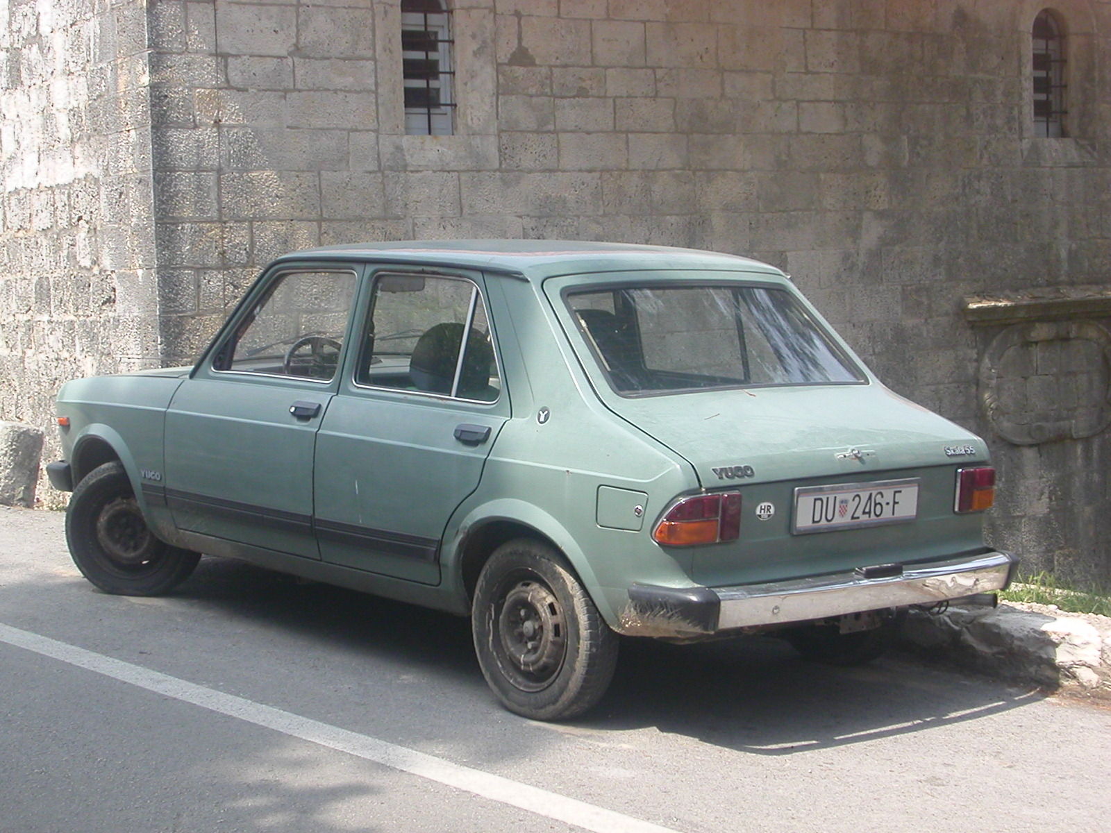 Yugo Zastava Skala 55 in Korčula town, Korčula. Photographed on 1st May 2007.